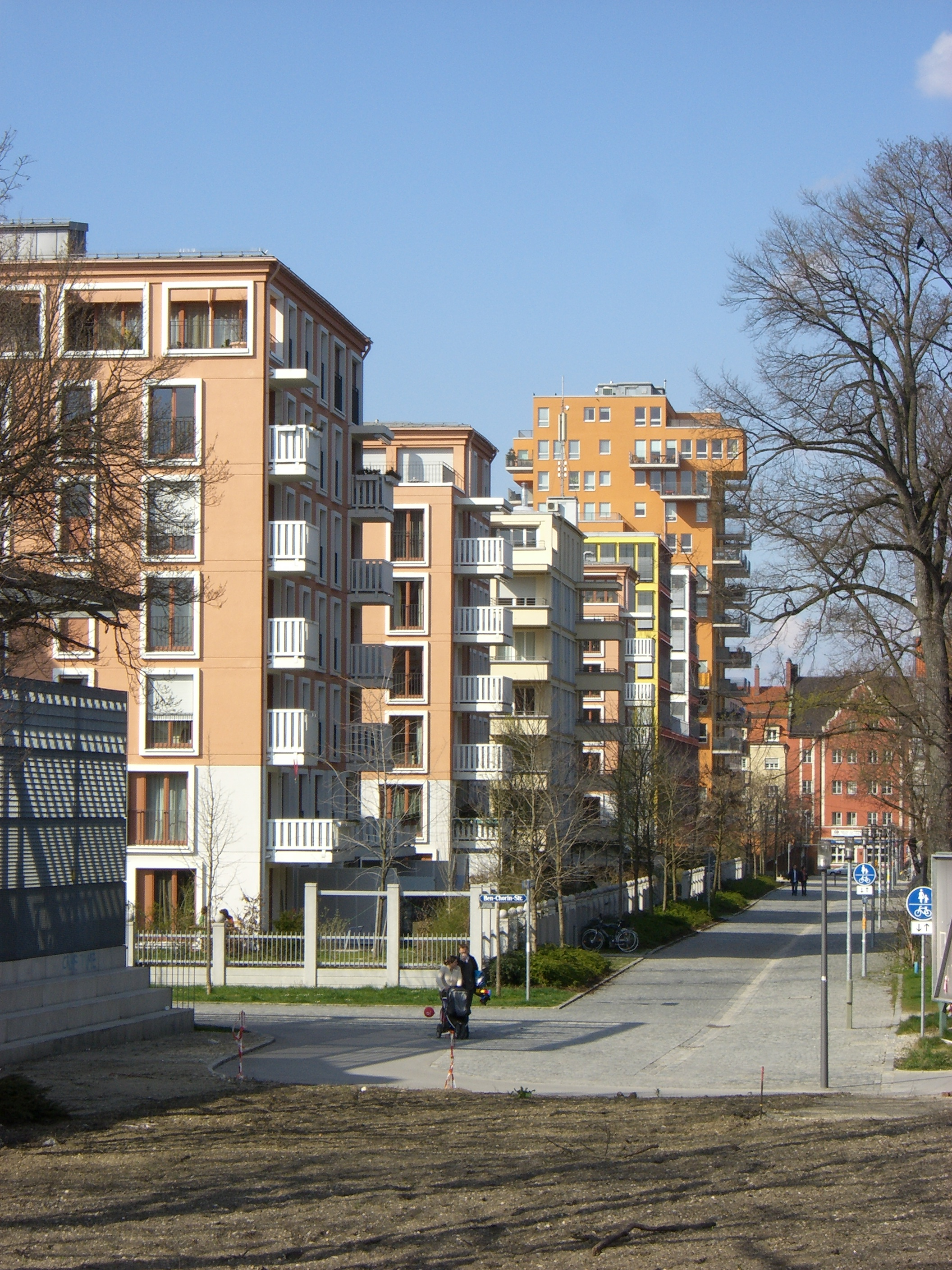 Gebäude von Otto Steidle auf der Münchner Theresienhöhe